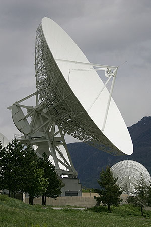 Satellitenschüssel (Leuk-Stadt)